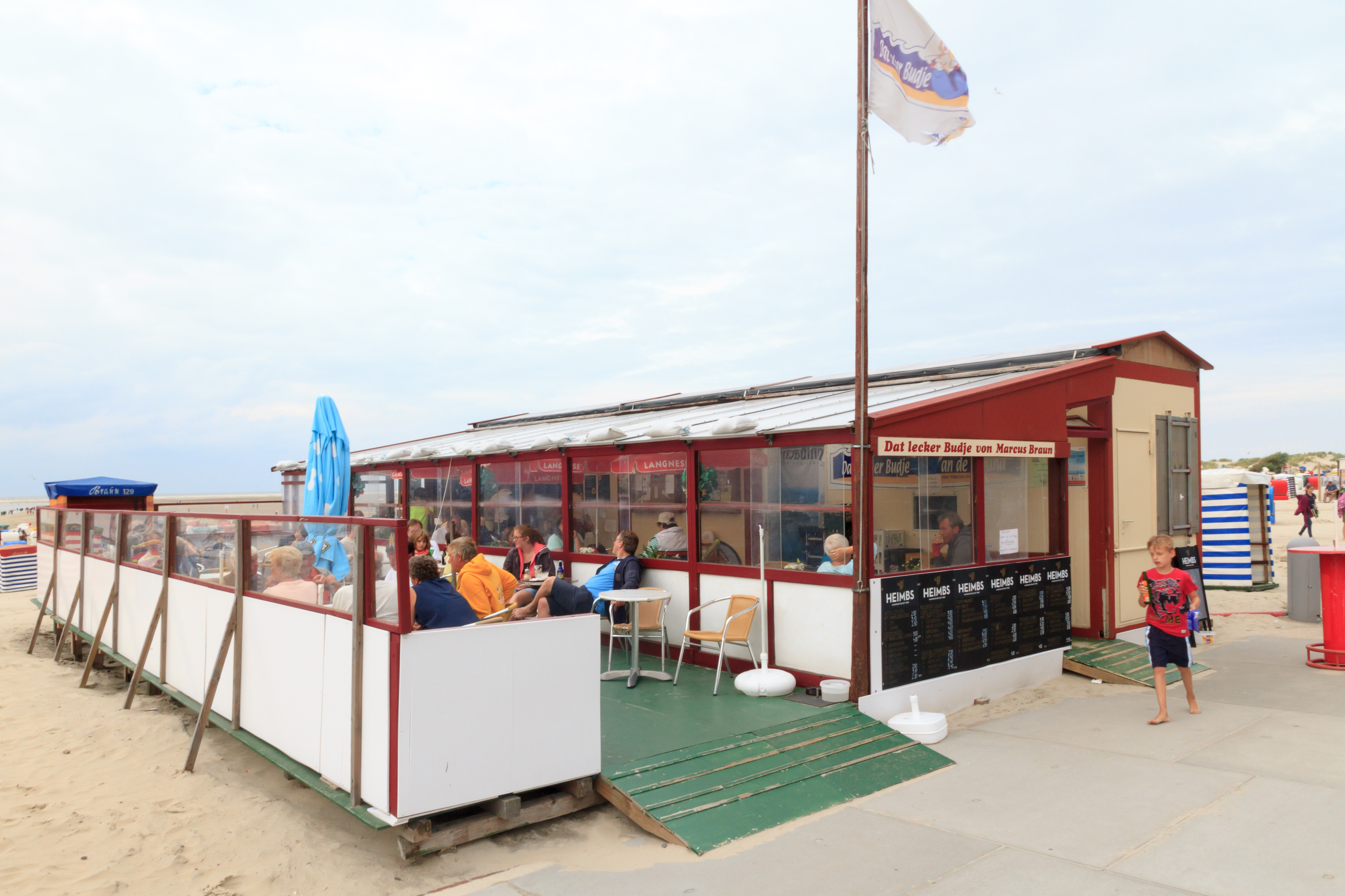 Borkum Promenade Milchbude